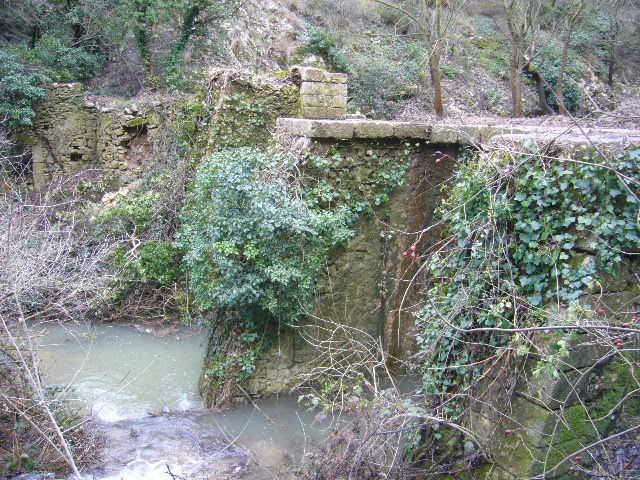 Située à l'entrée du vallon, cet ouvrage de grande taille alimente en eau un moulin (en ruine) construit en contrebas.